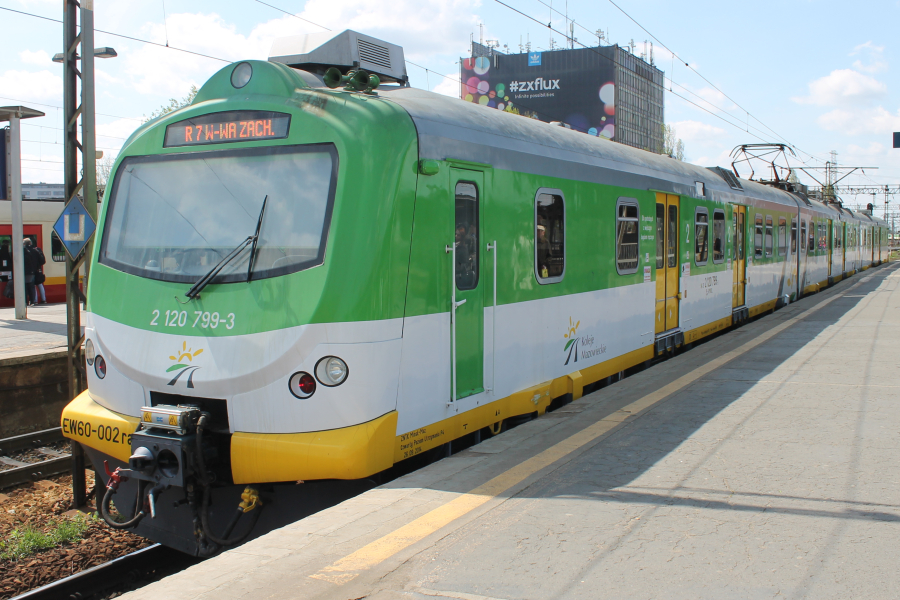 Elektryczny zespół trakcyjny EW60-002 skończył bieg na stacji Warszawa Zachodnia.